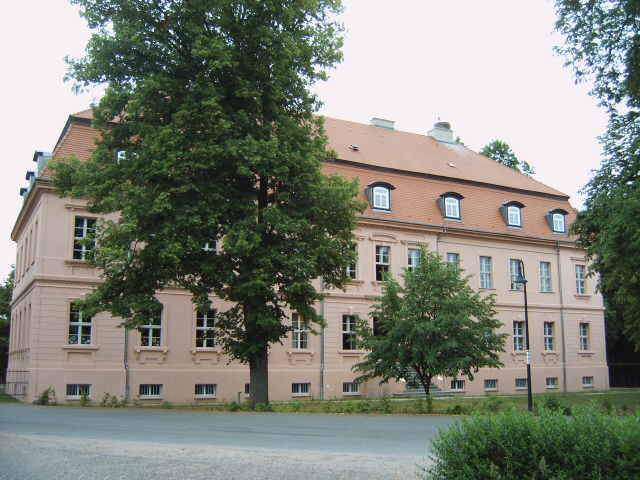 Schloss von Straupitz, Land Brandenburg, Deutschland